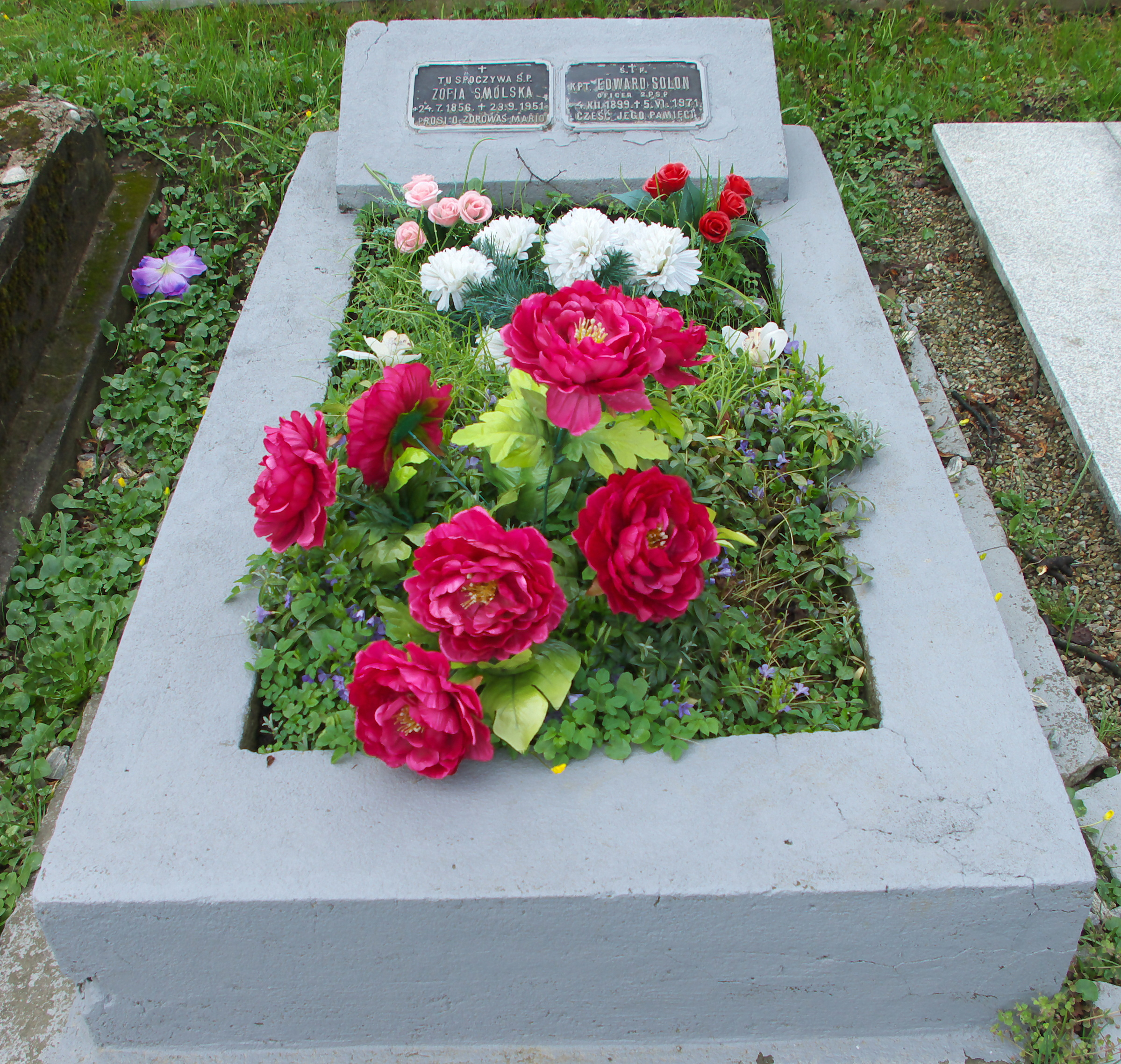 Nagrobek Zofii Smólskiej and Edwarda Solona na Cmentarzu Centralnym w Sanoku.